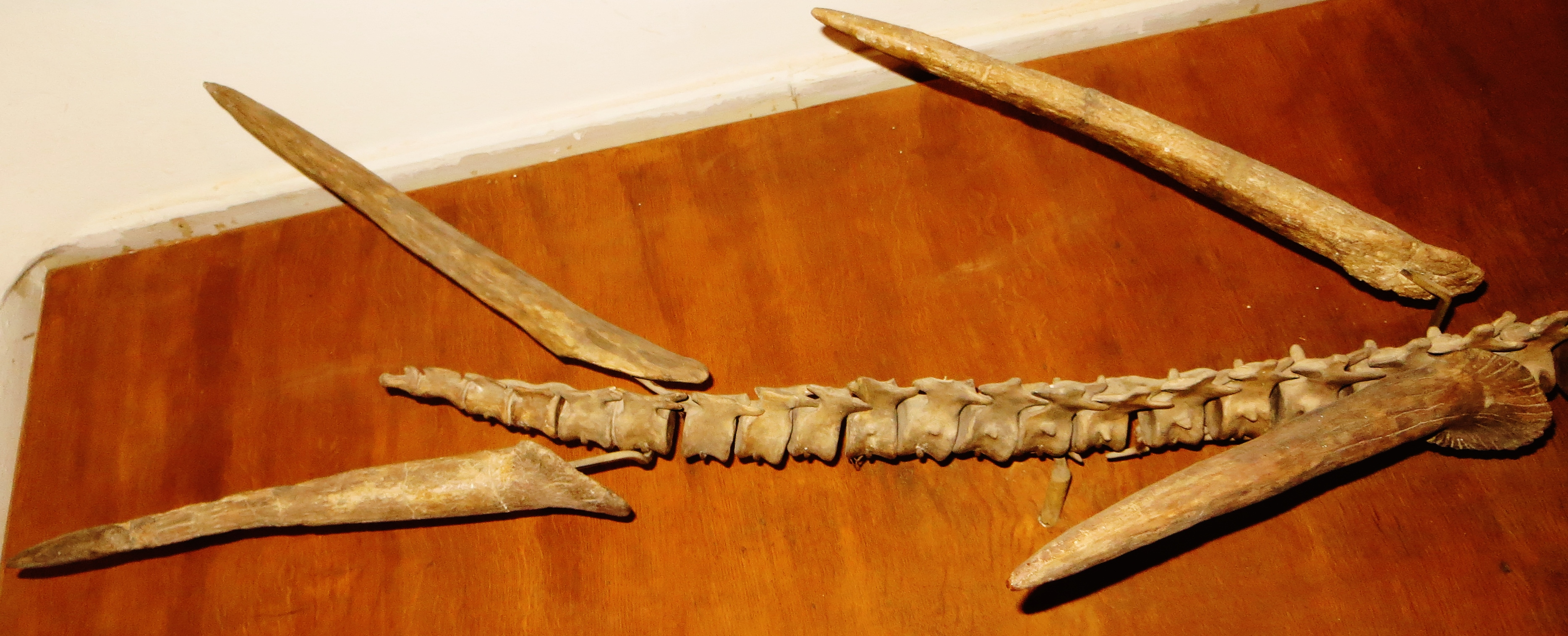 Fossil of Kentrosaurus, an extinct reptile - Took the picture at Museum of Paleontology of Tuebingen